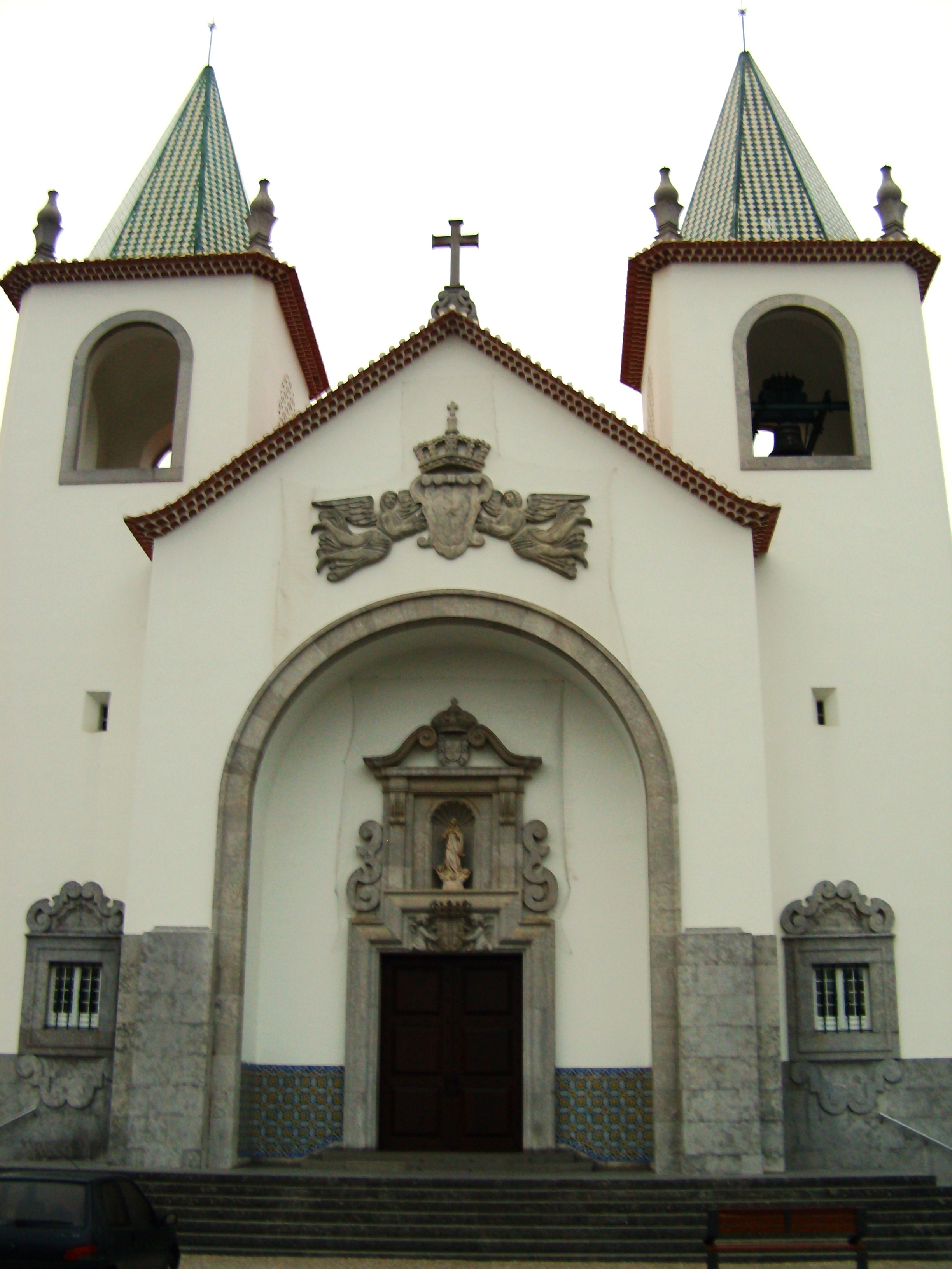 Igreja de Nossa Senhora da Conceição, Caldas da Rainha, distrito de Leiria, Portugal: portada.